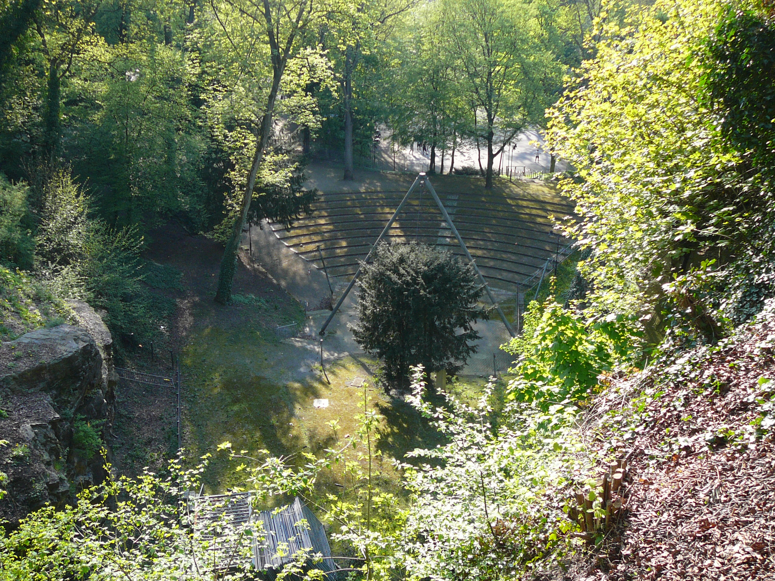 Hardt-Anlagen, Wuppertal